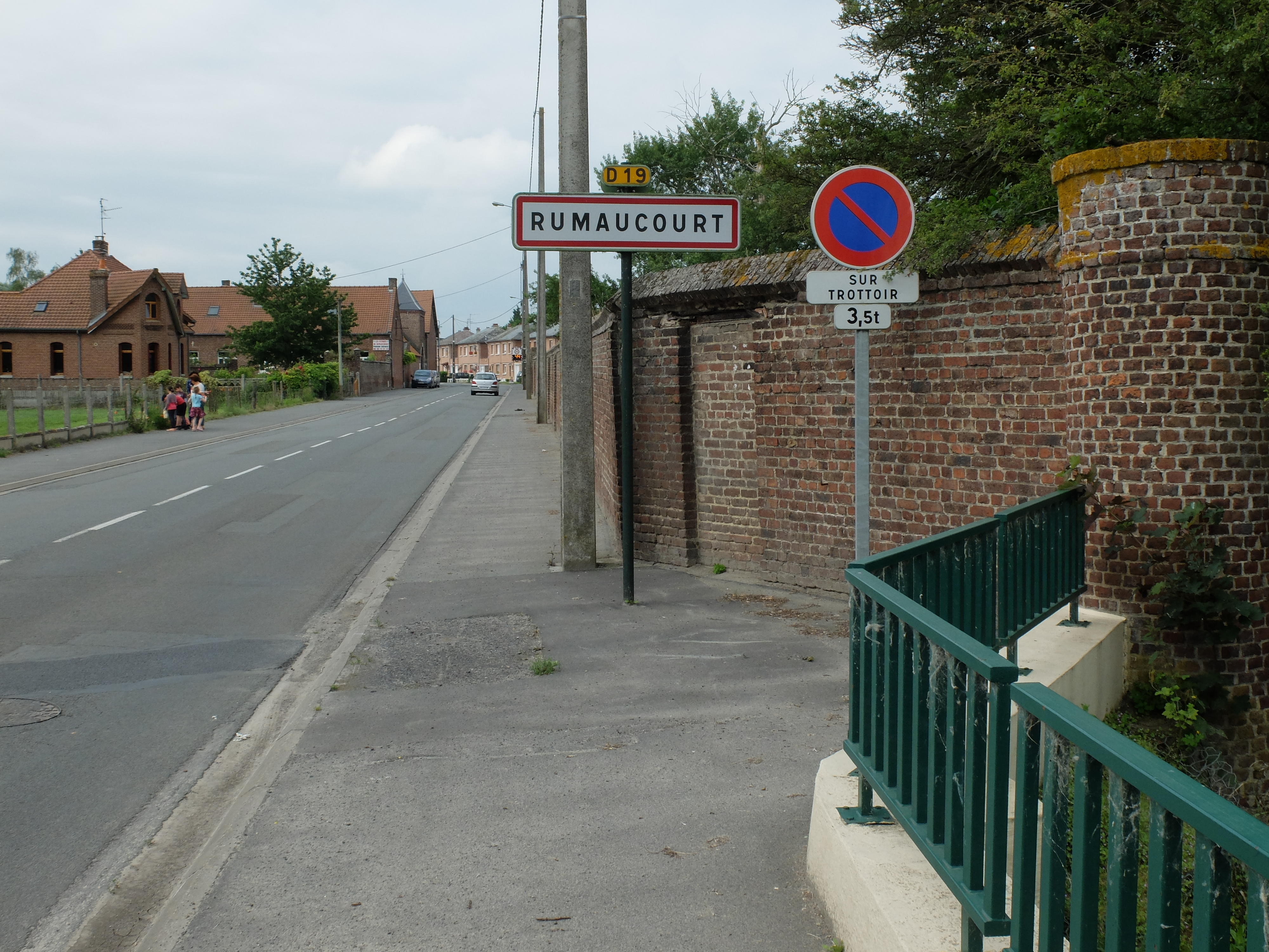 Vue d'une entrée de la commune de Rumaucourt.